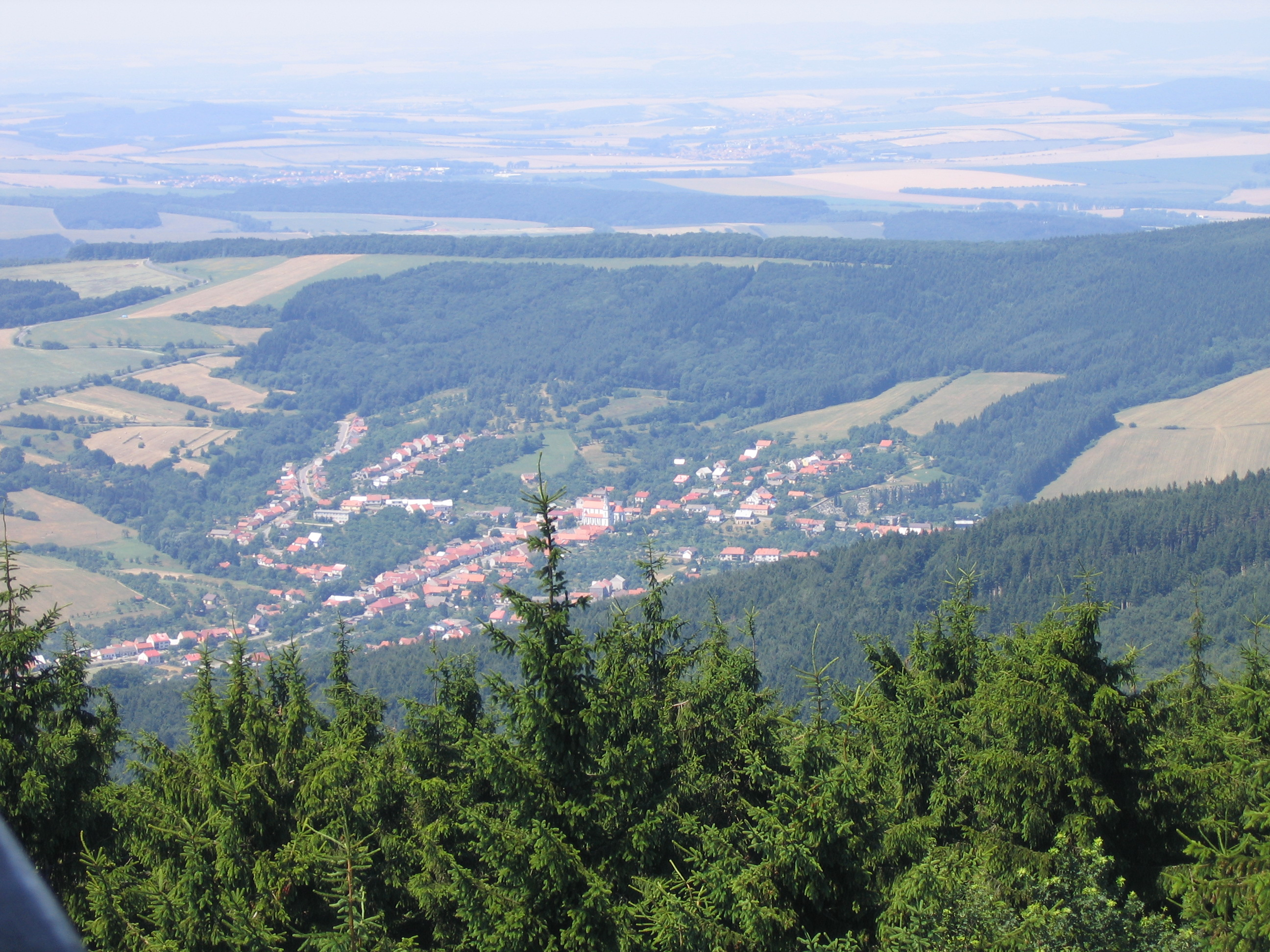 Autor: Ervín Pospíšil